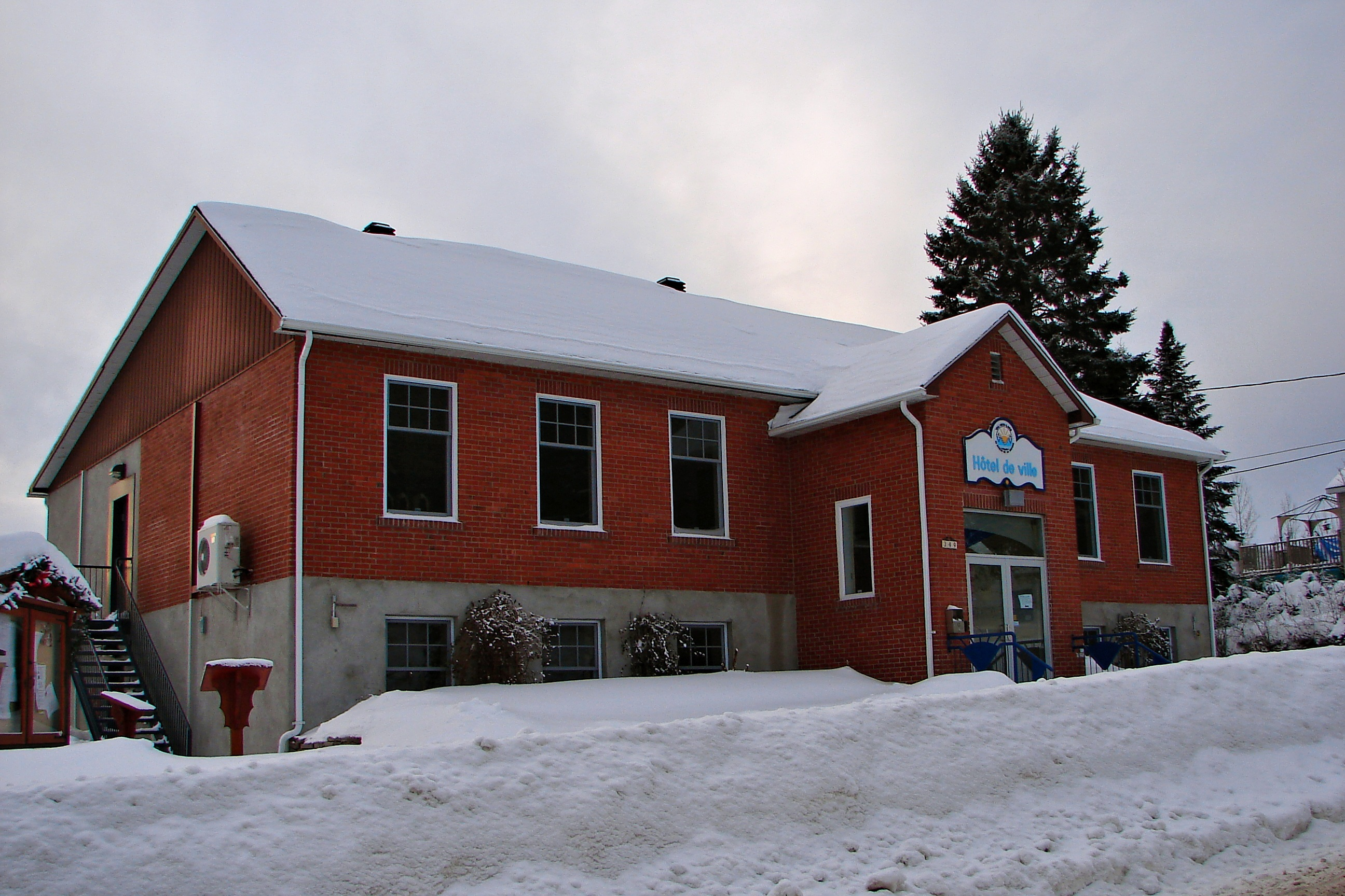 Val-des-Lacs, Quebec, Canada